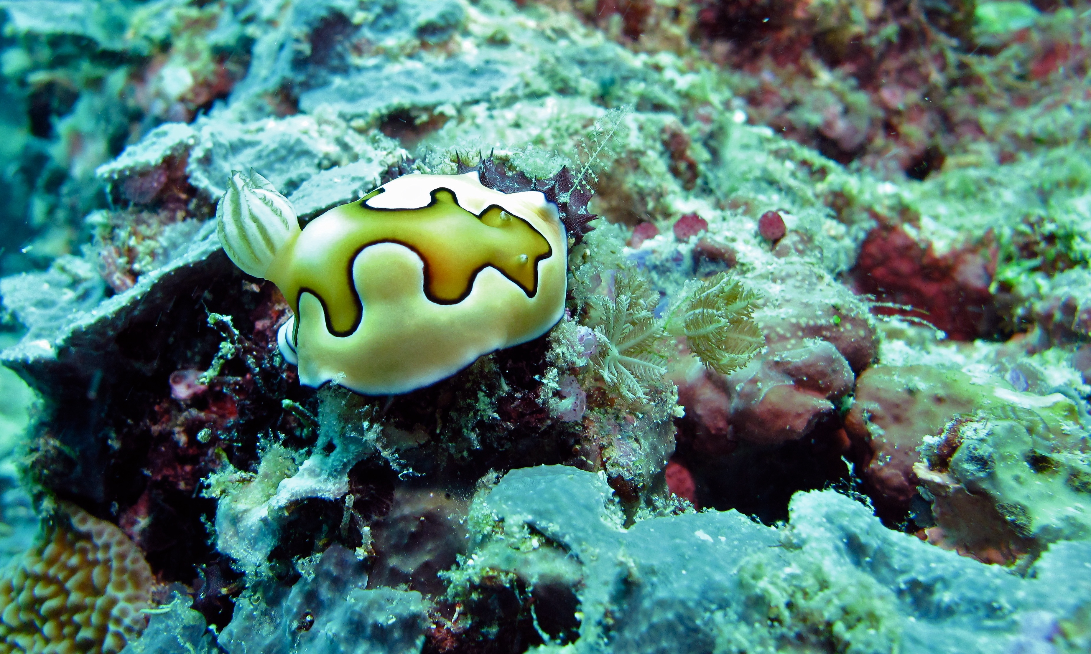 Turtle Cave, Pulau Sipadan, Sabah, MALAYSIA